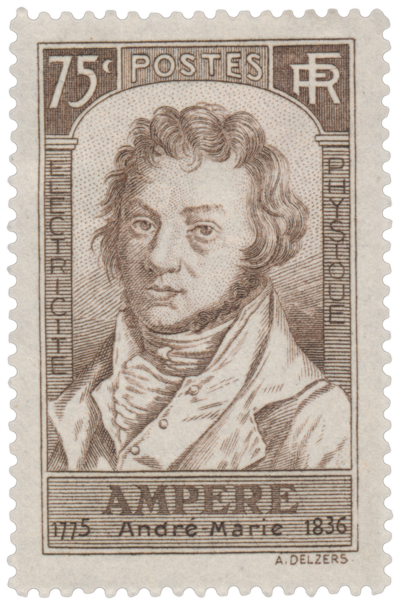 André Marie Ampère (1775-1836)